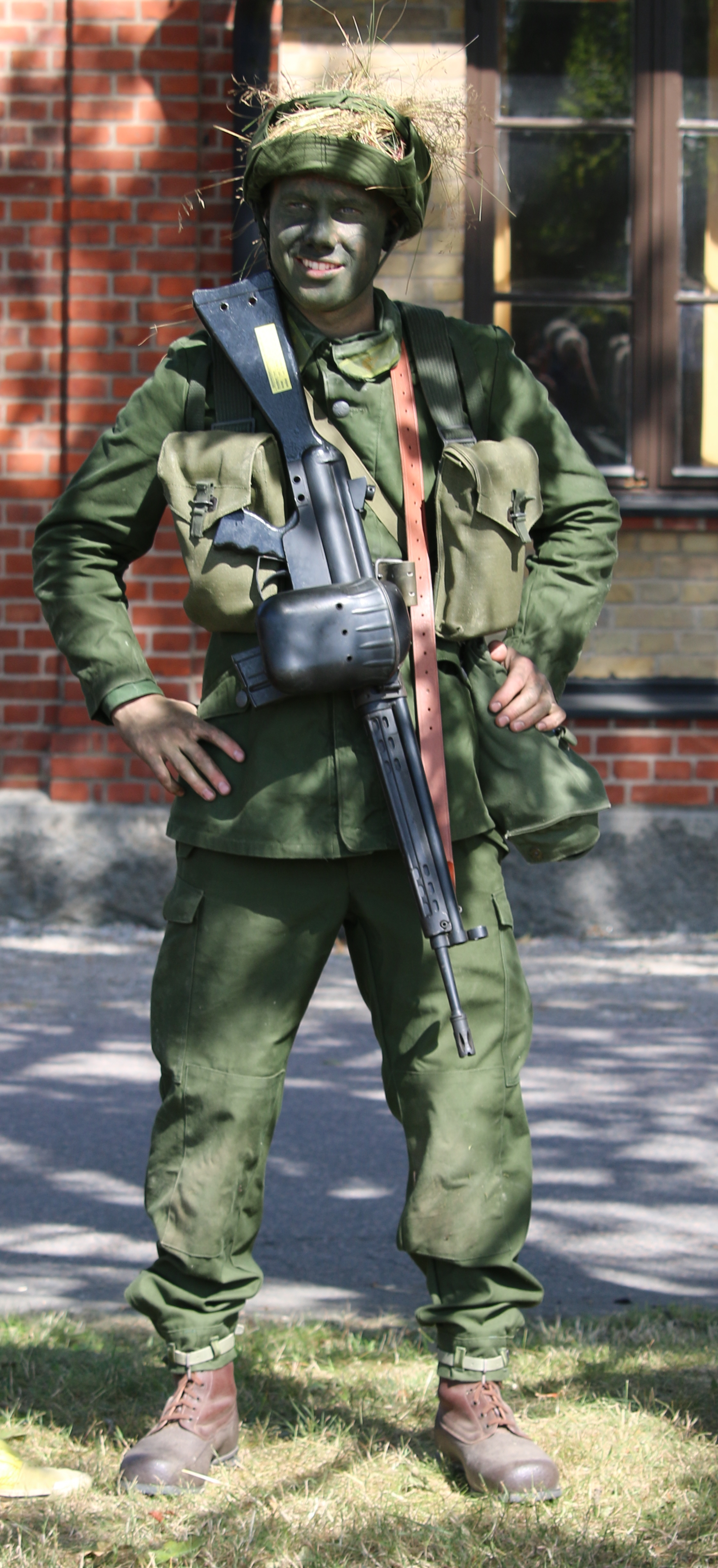 Soldat m/59 Revinge 2015